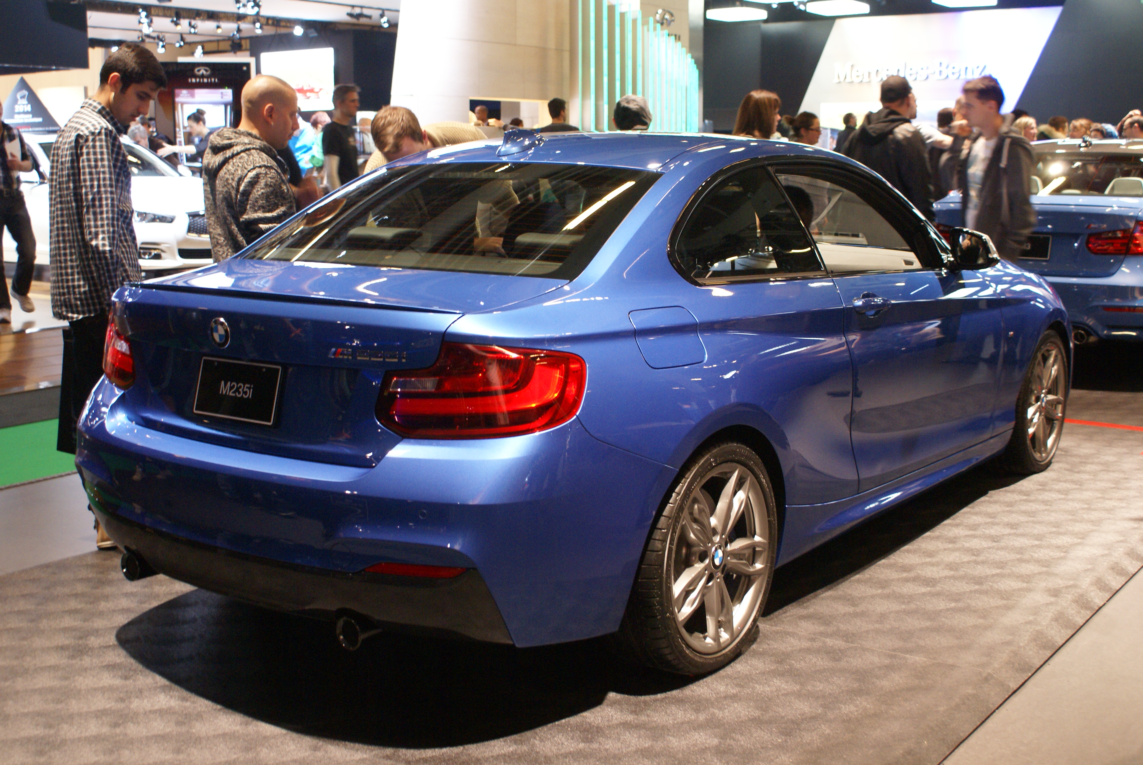 BMW M235i at Salon International de l’auto de Montréal 2014